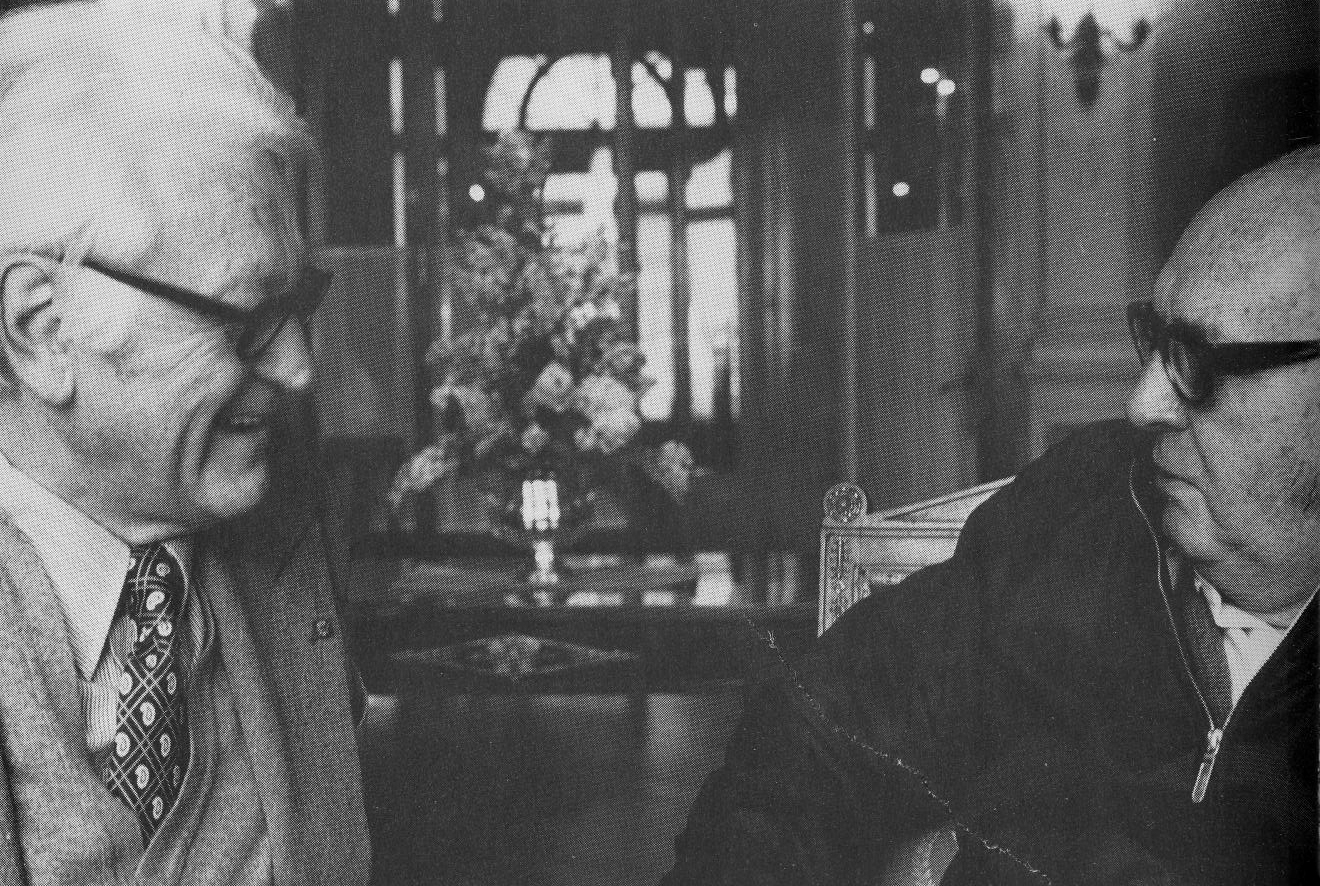 Николай Набоков (слева) с кузеном Владимиром Набоковым